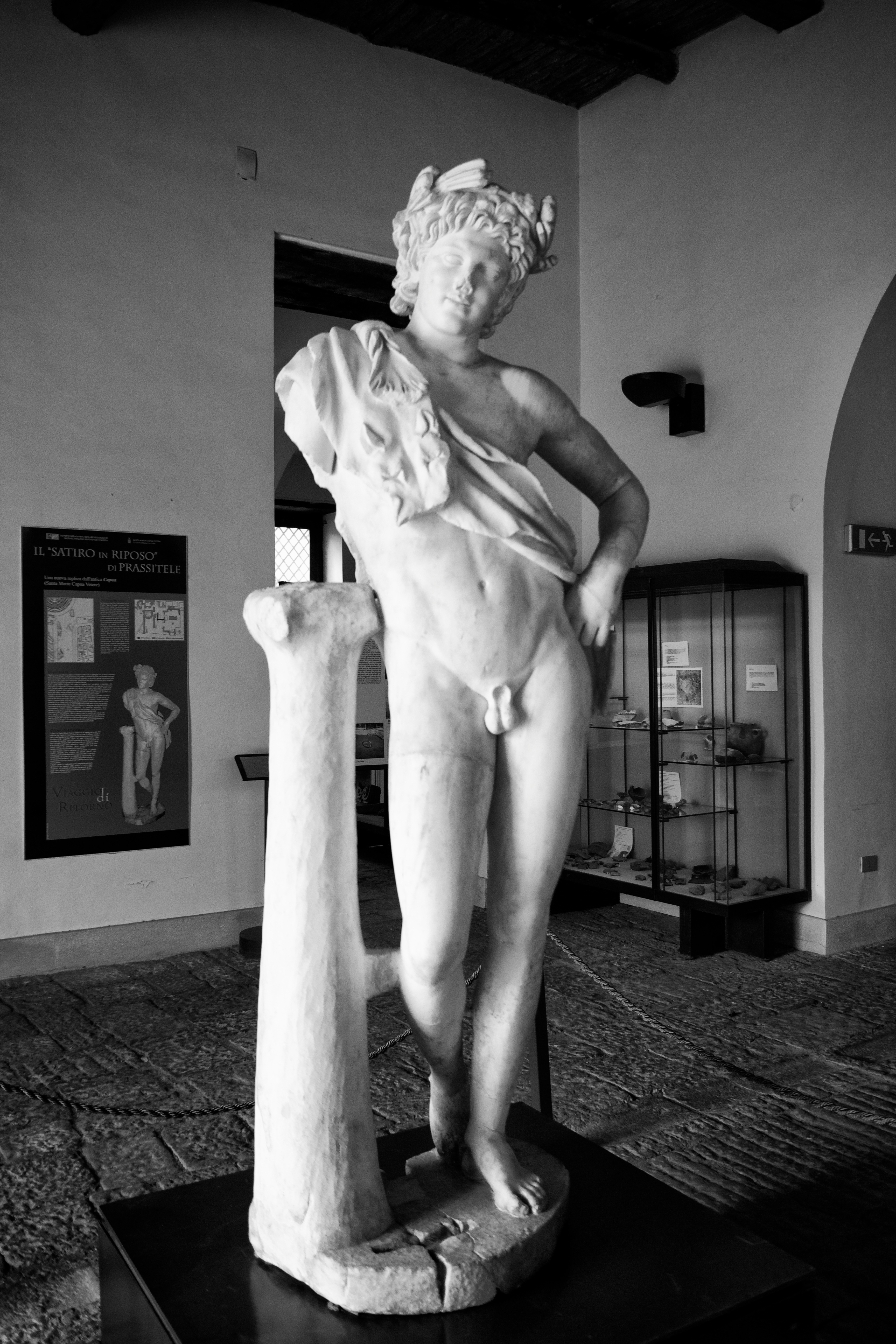 Museo Archeologico dell'Antica Capua This is a photo of a monument which is part of cultural heritage of Italy.